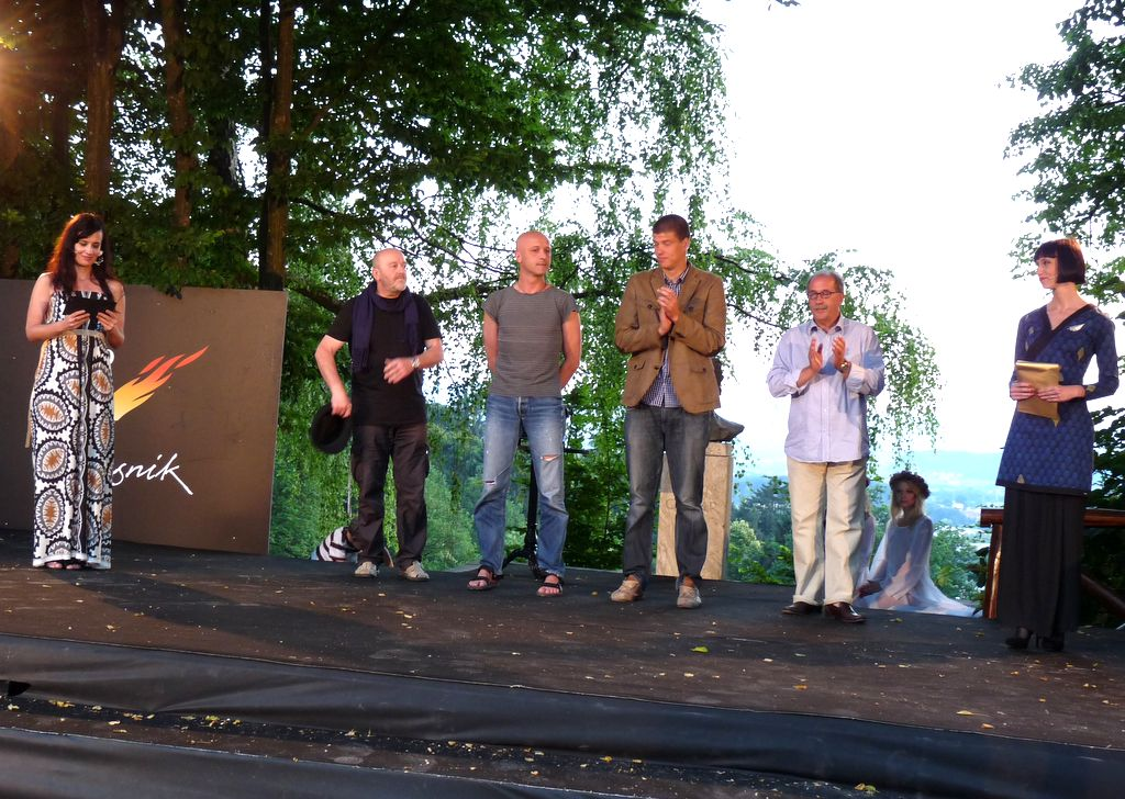 Kresnik